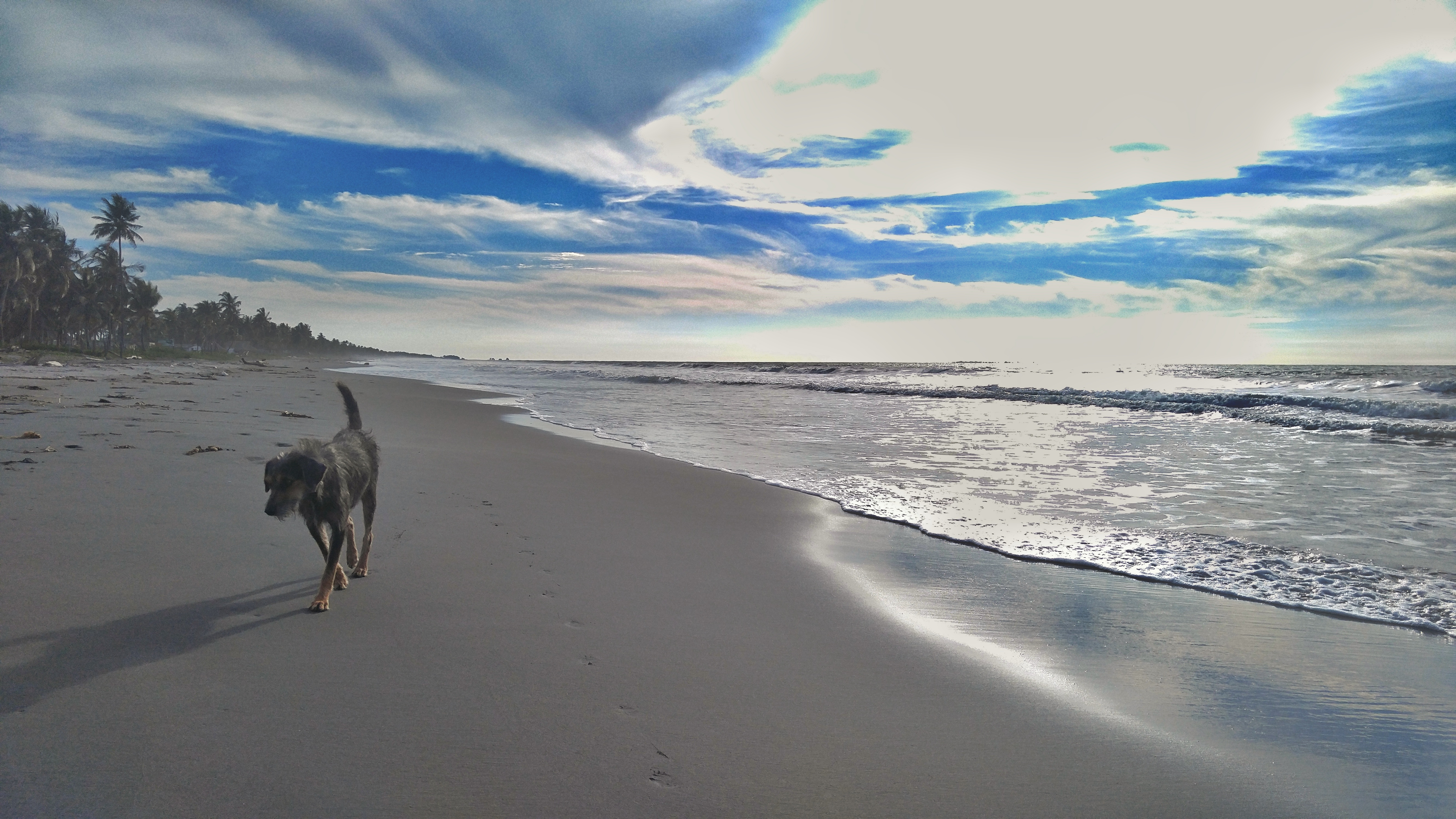 Representa a uno de tantos perros callejeros que sobreviven en todas partes de Colombia. Me gusta retratarlos. Esta fotografía fue tomada en el municipio colombiano con código 23675.